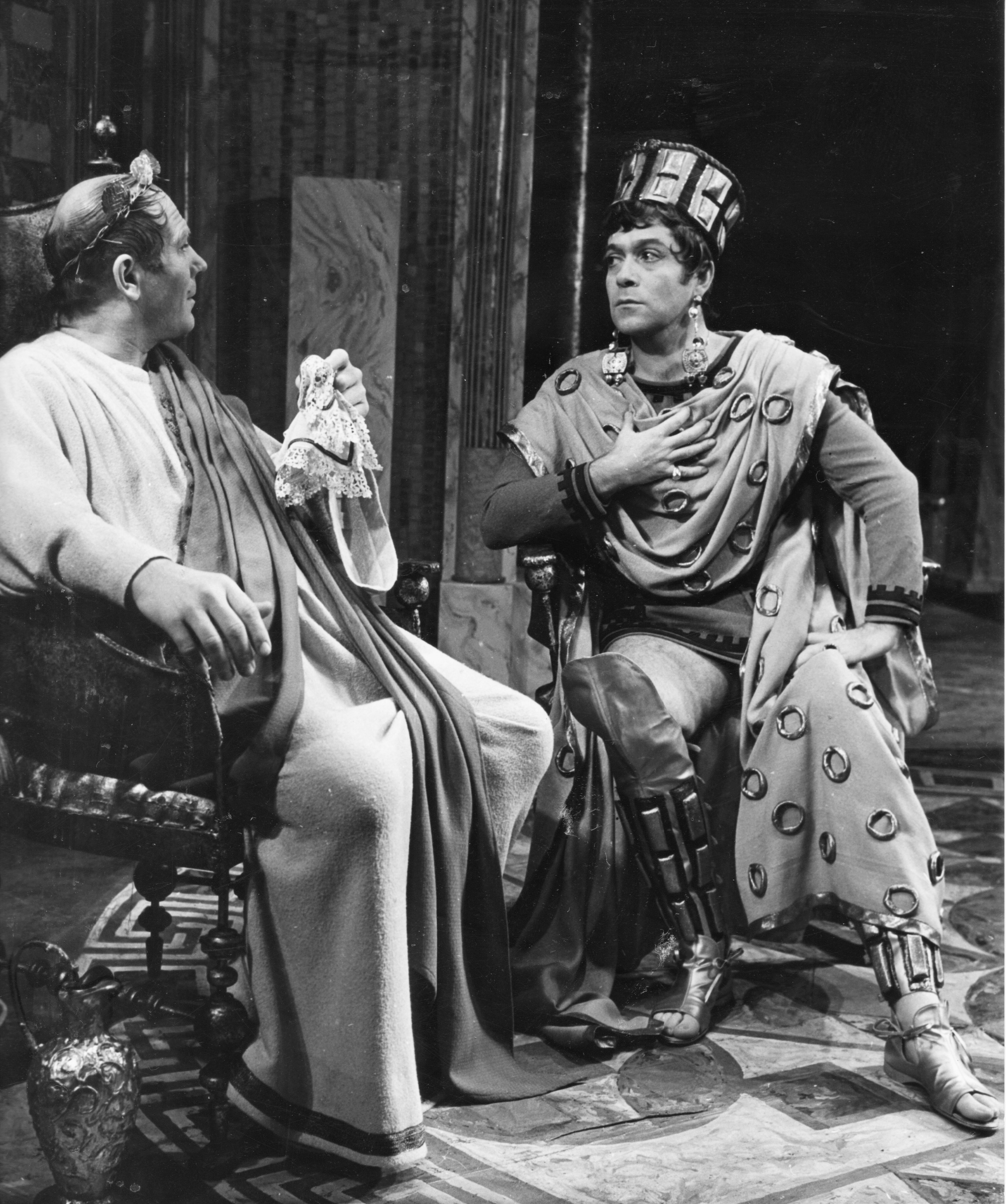 Madách Színház, Pécsi Sándor és Márkus László színművészek Dürenmatt: A nagy Romulus c. darabjának előadásán.